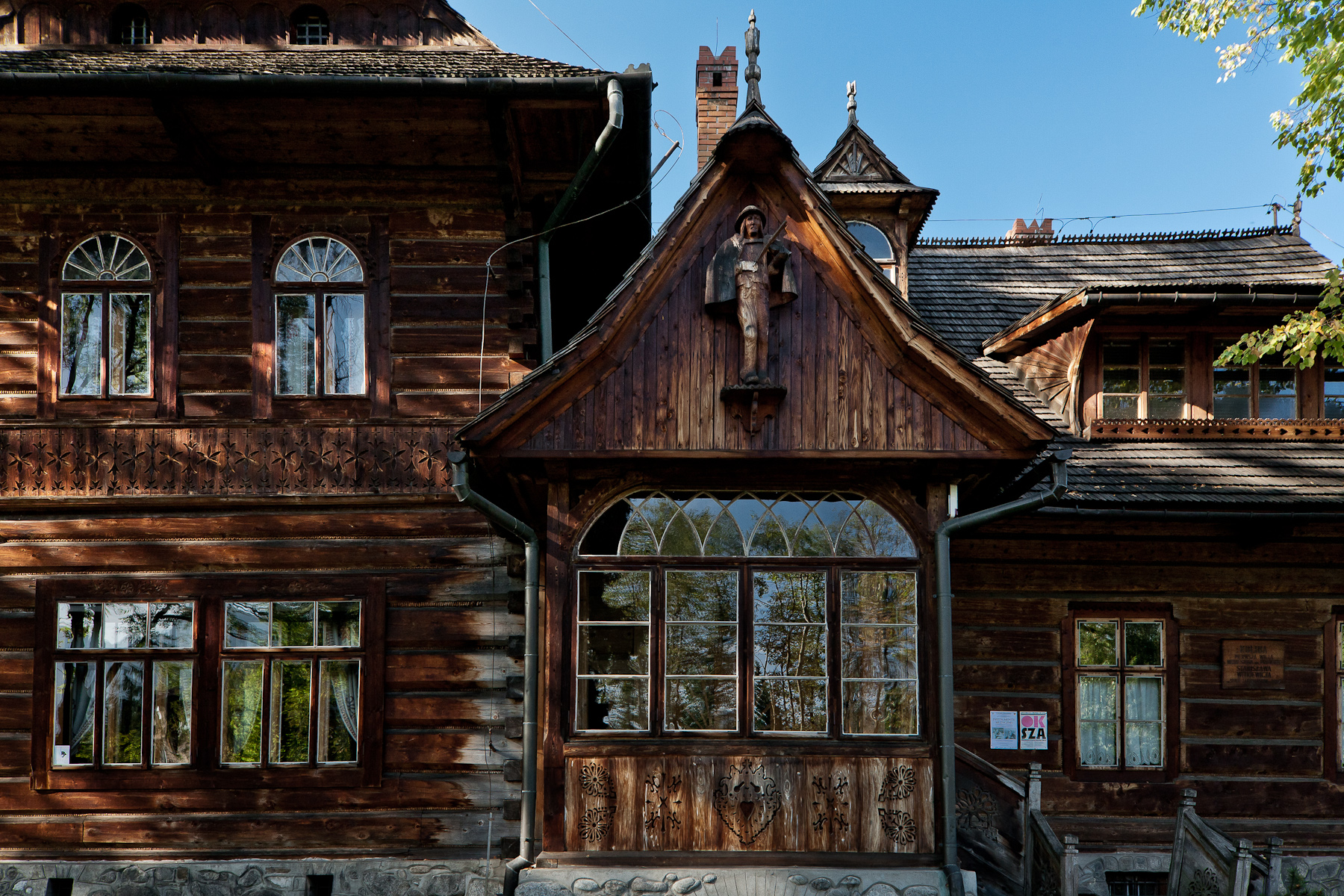 Willa drewn. „Koliba”, Zakopane